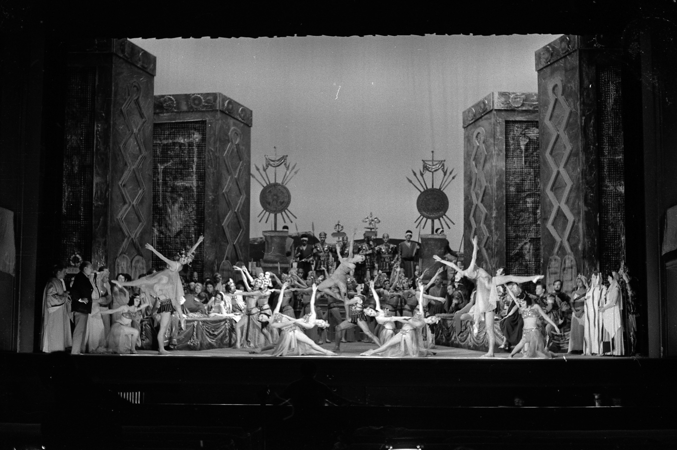 Théâtre du Capitole. Le 15 Octobre 1970. Vue de la représentation d'Herodiade au théâtre du Capitole.